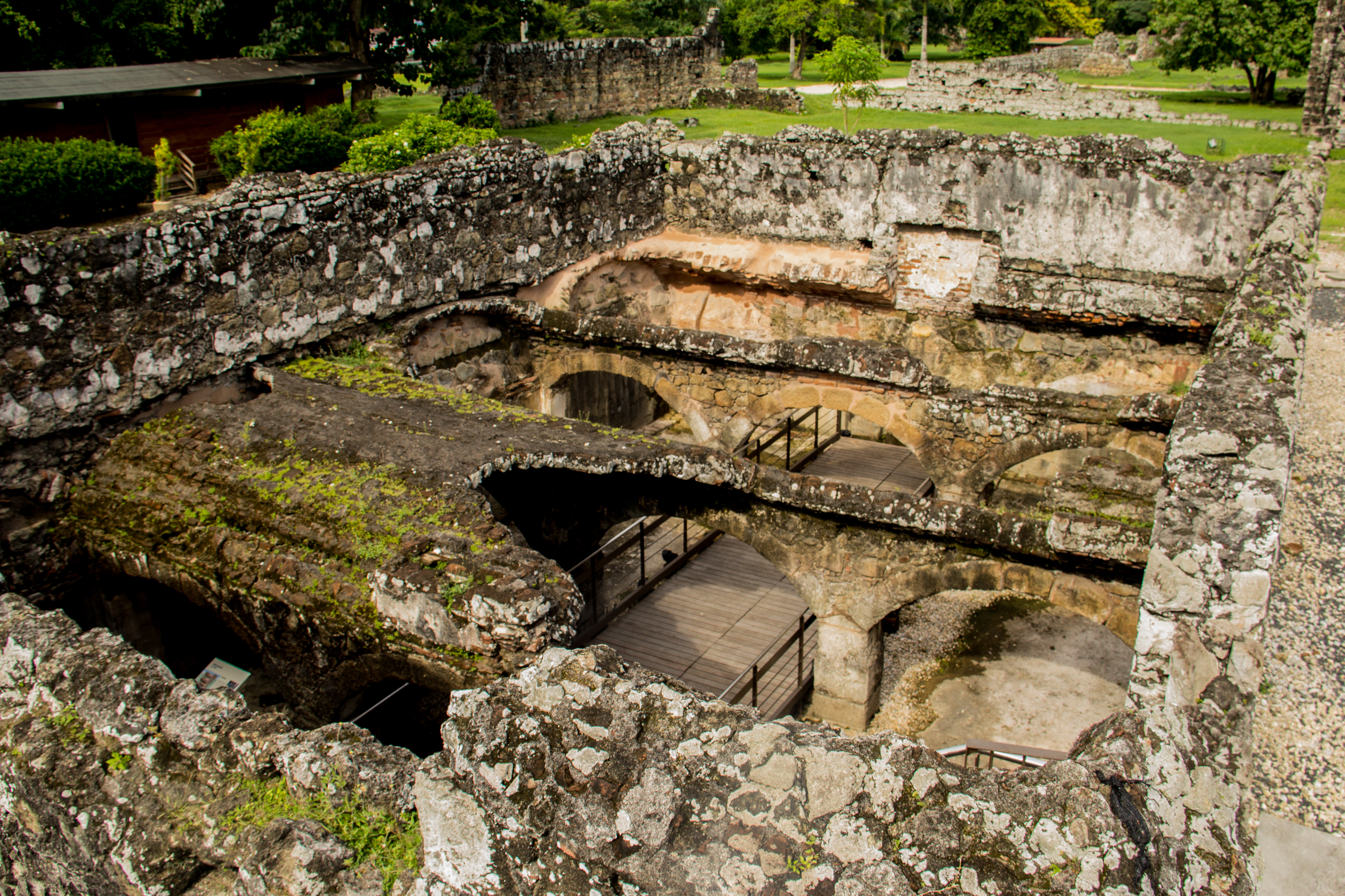 Un aljibe es un reservorio de agua lluvia, muy común en las construcciones coloniales. Este Aljibe que forma parte del Claustro del Convento de las Monjas de la Concepción es el único descubierto hasta el momento de lo que fue la Ciudad de Panamá.